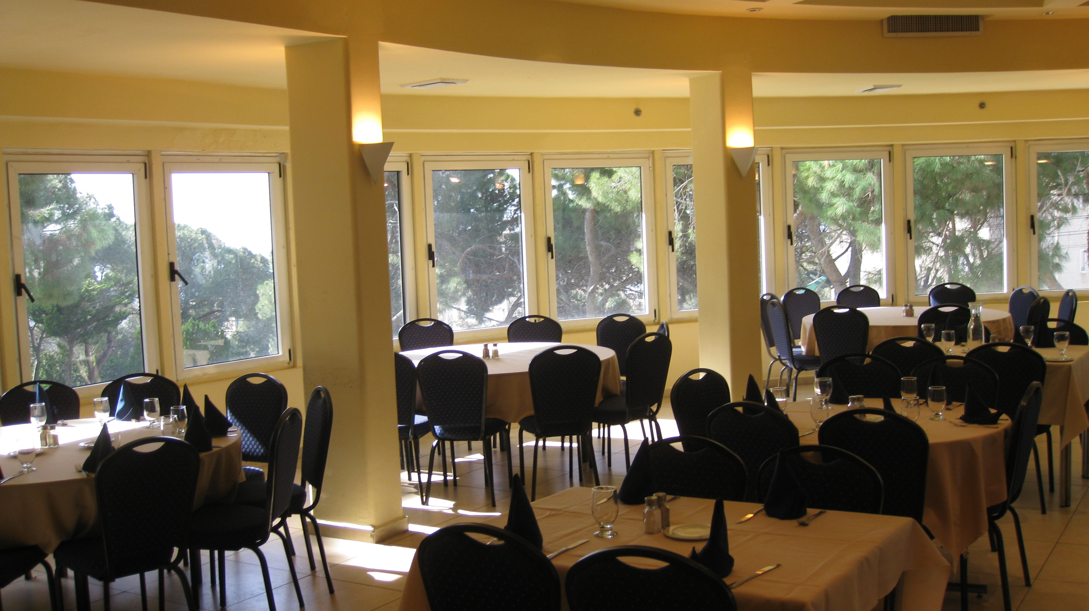 Har HaCarmel Hotel מלון הר הכרמל